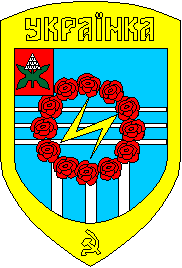 Ukrain t